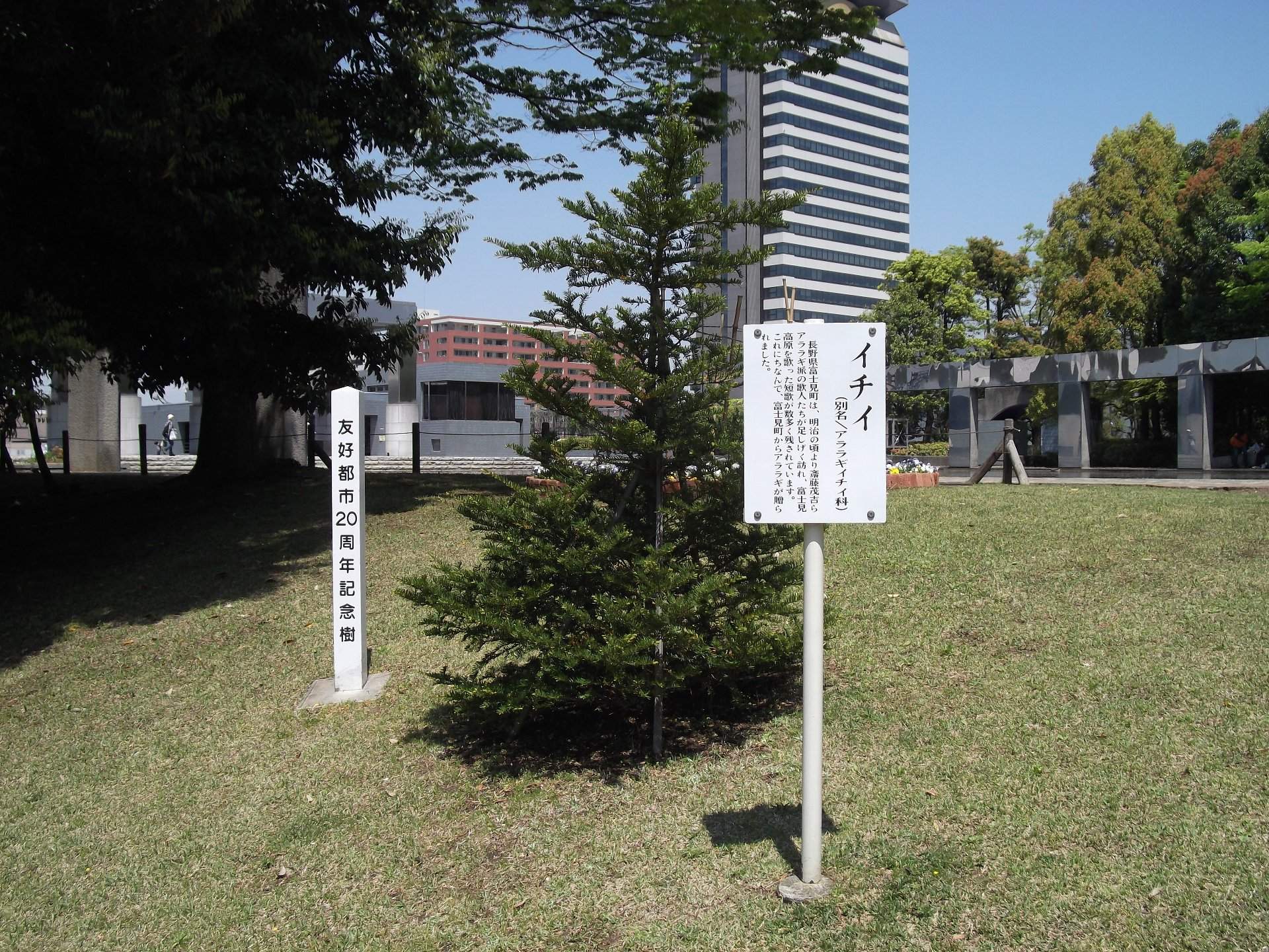 イチイ。東京都多摩市。